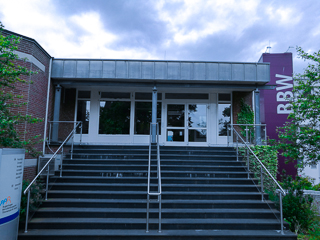 Eingangsbereich des Bugenhagen Berufsbildungswerkes